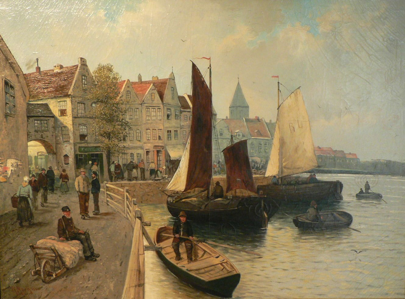 Königsberg in Preußen